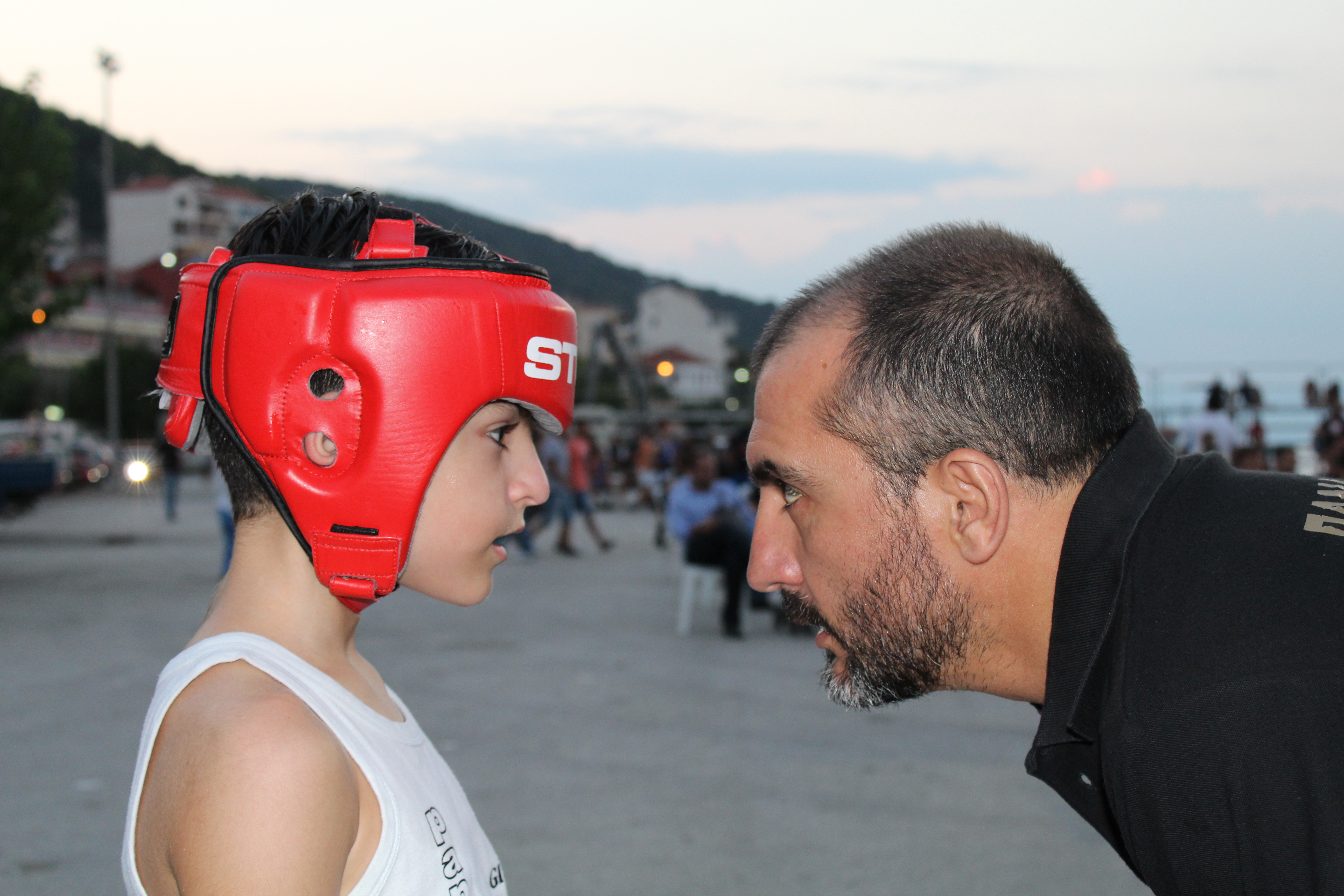 coach Pleas Nikos